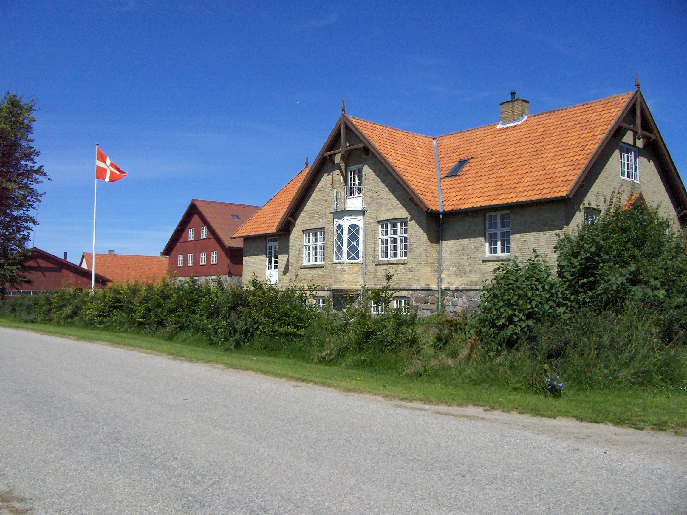 Mineslund ved Kalundborg